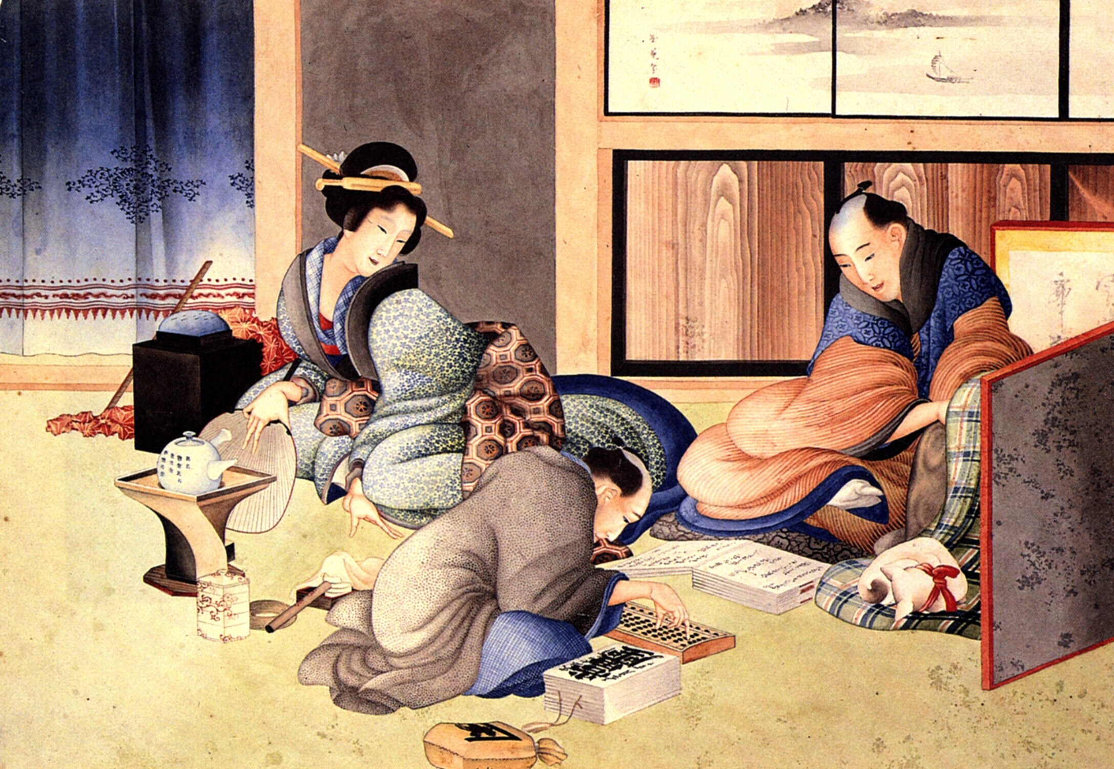 Ukiyo-e